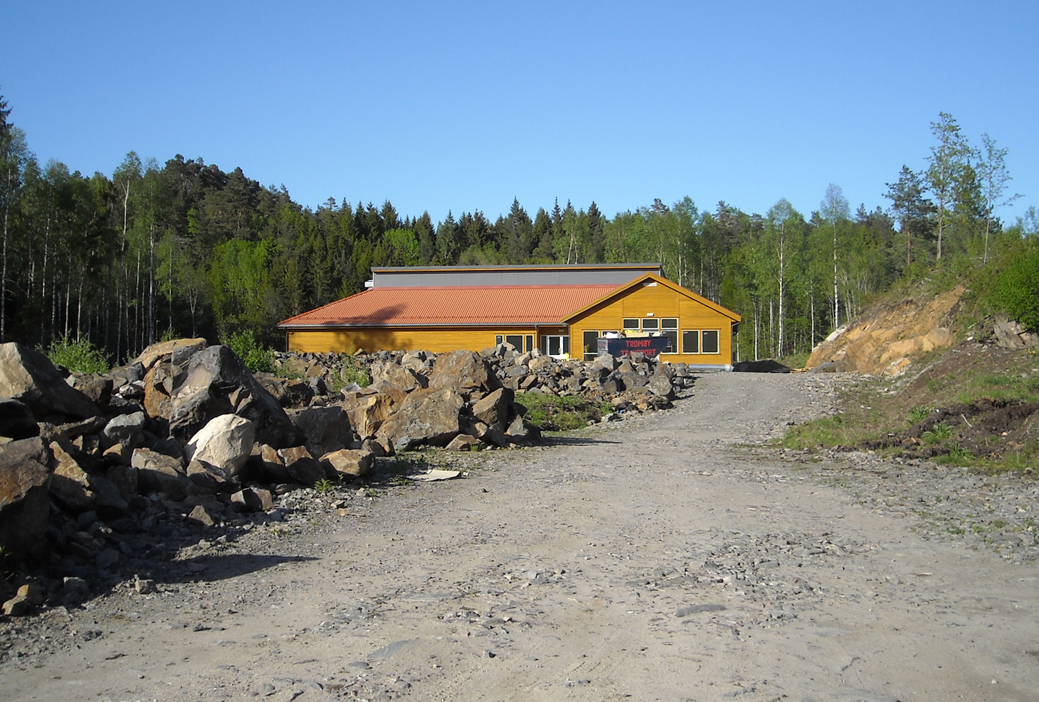 Strengereid grendehus under oppføring i 2010